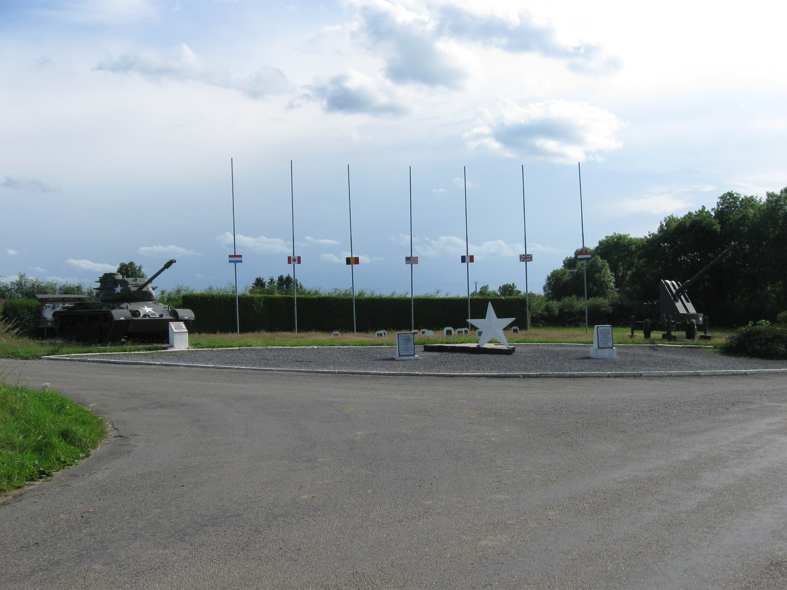 mémorial